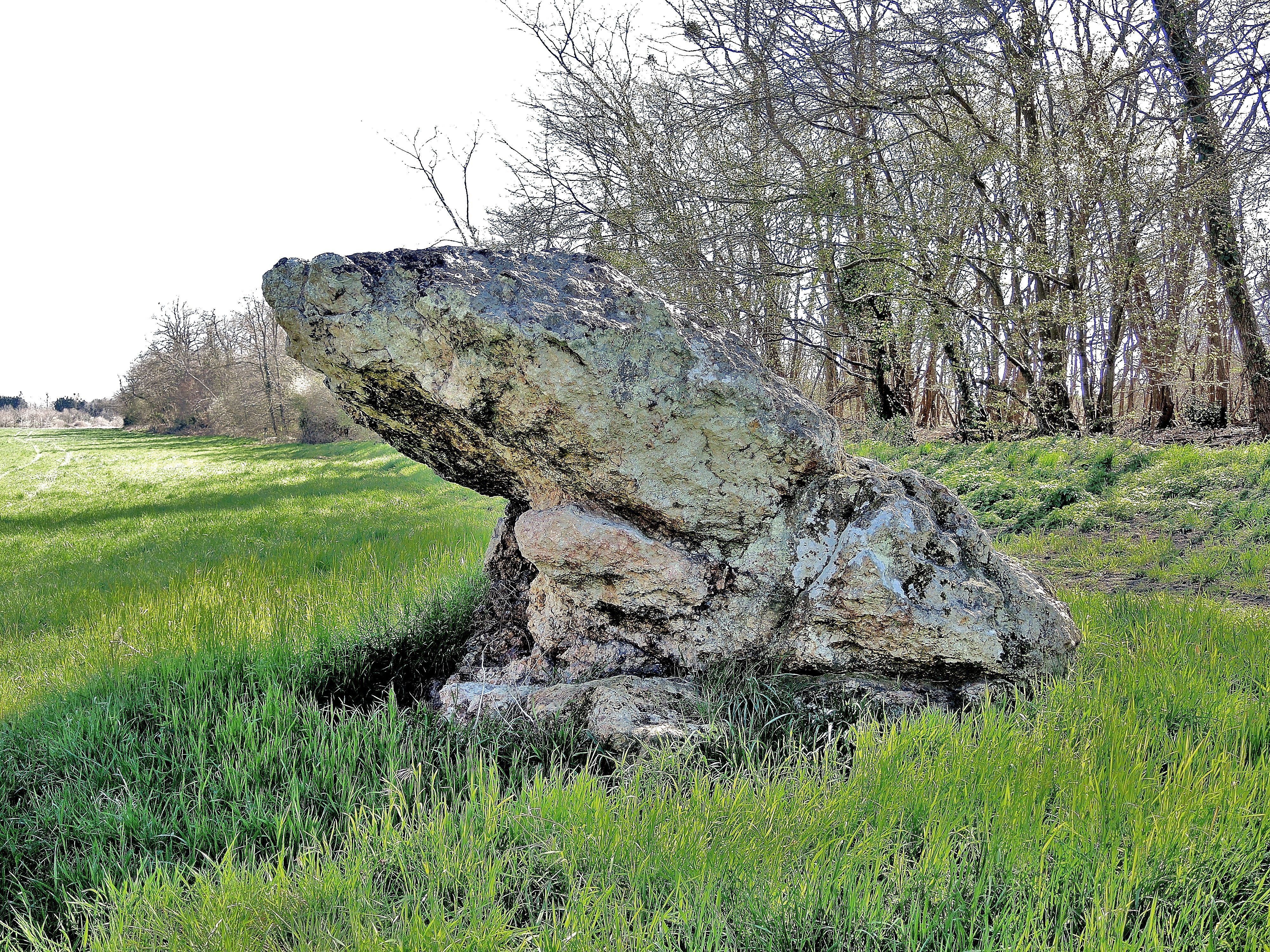 Rocher le crapaud. Menhir supposé.